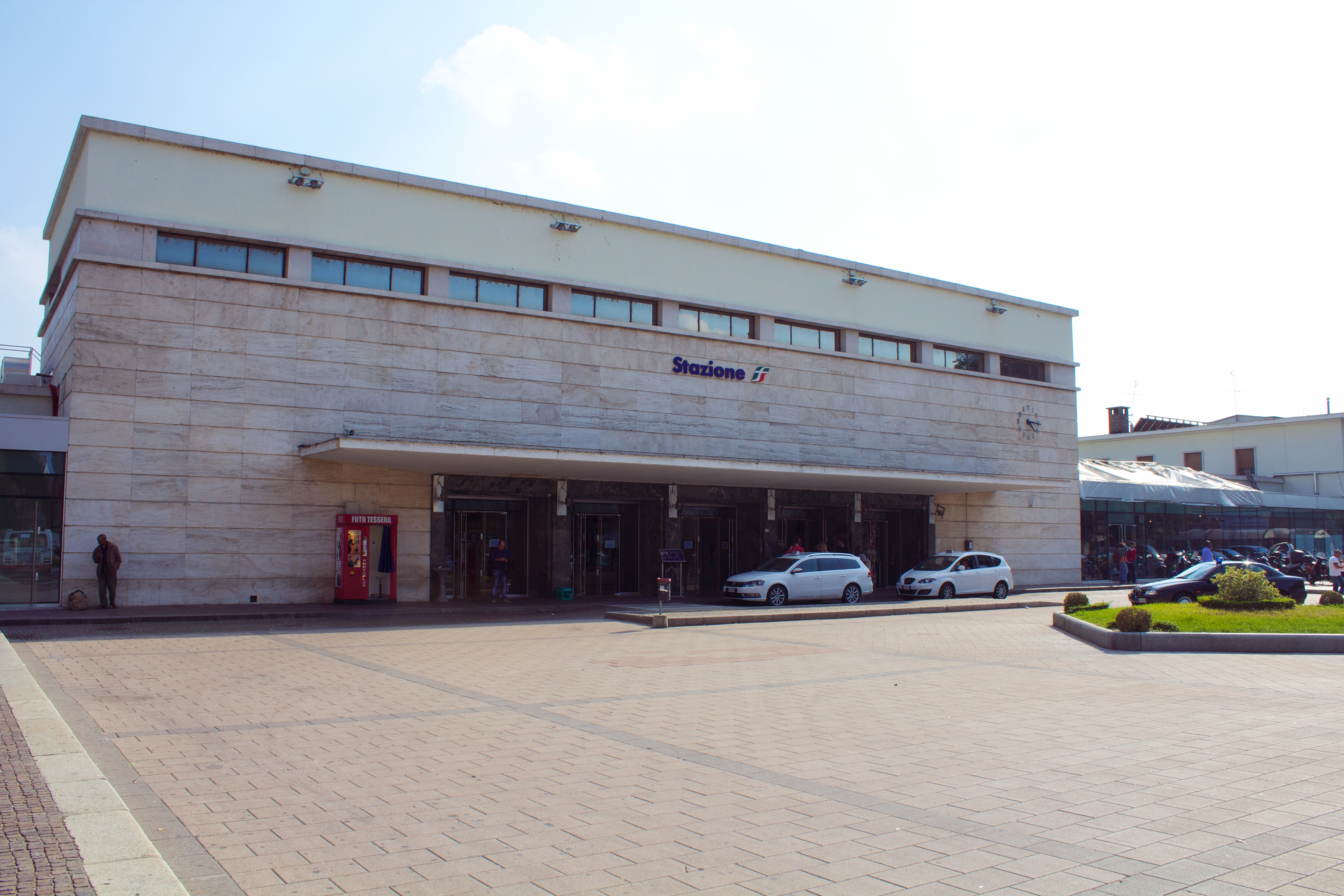 Facciata della stazione di Asti